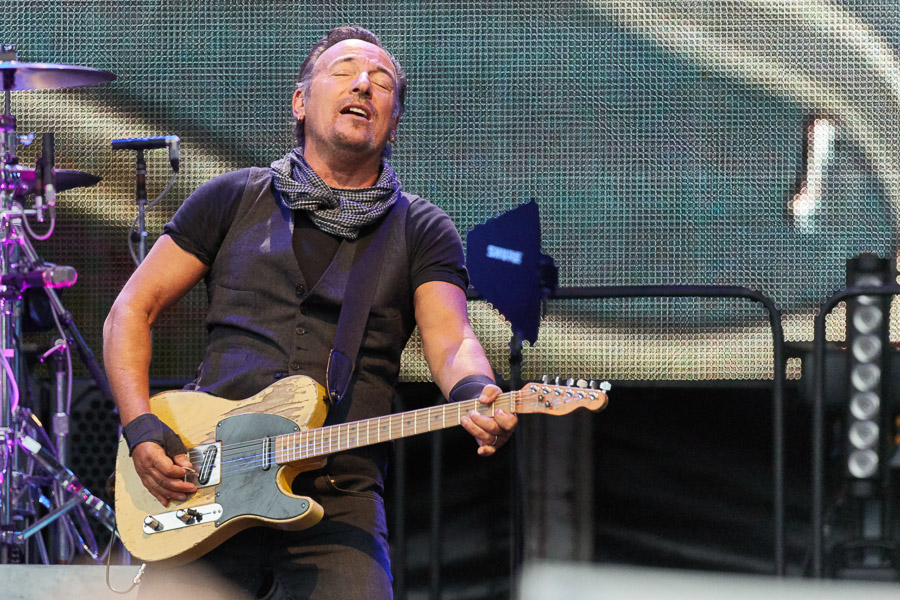 Bruce Springsteen opptrer på Ullevaal stadion 29. juni 2016.